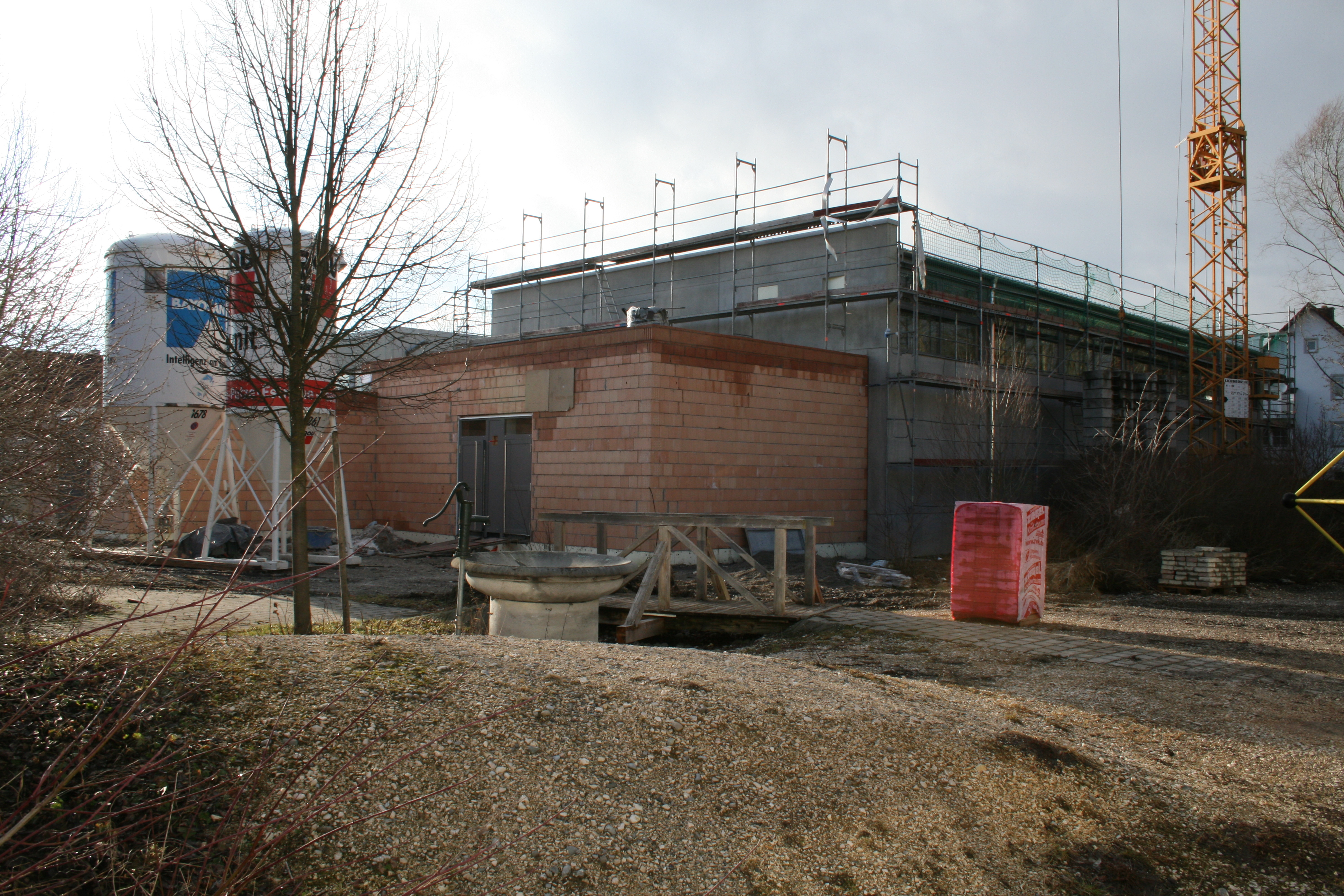 Erweiterung der Turnhalle der Volksschule Amendingen